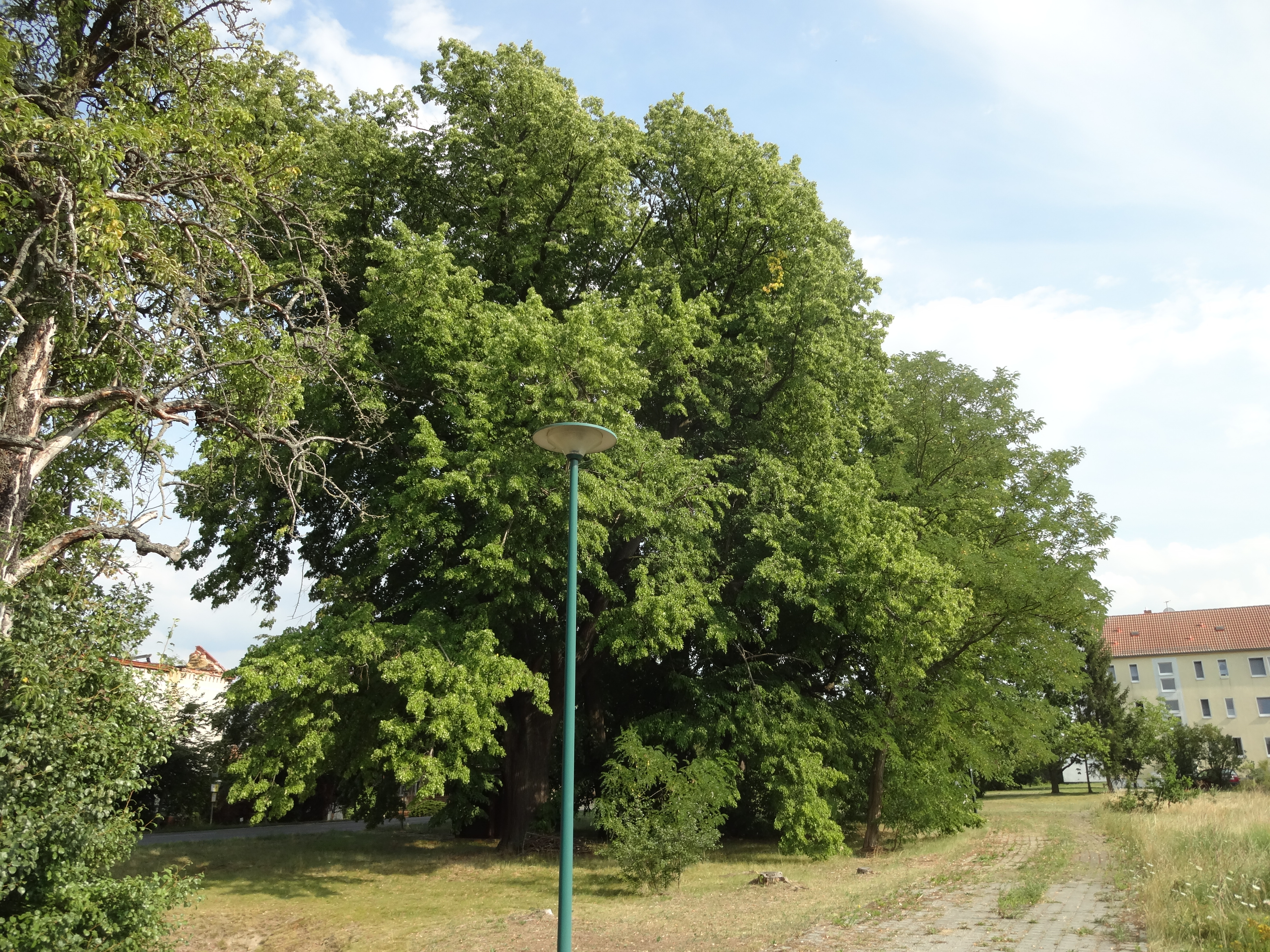 Naturdenkmal Winterlinde an der Berliner Chaussee (gegenüber Gaststätte Walnuss) in Ragow (Lübbenau/Spreewald)